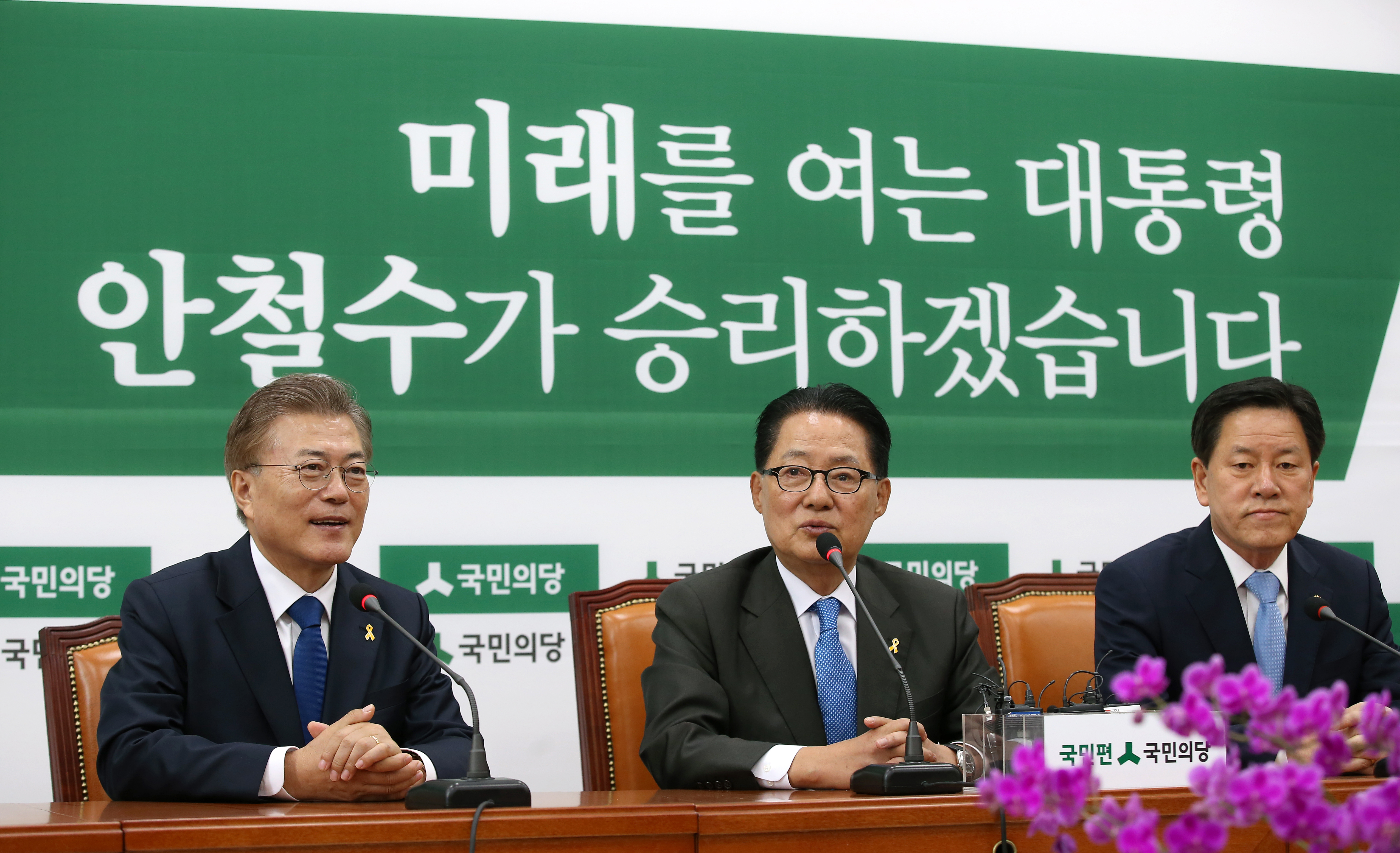 문재인 대통령의 국민의당 방문 (2017년 5월 10일)